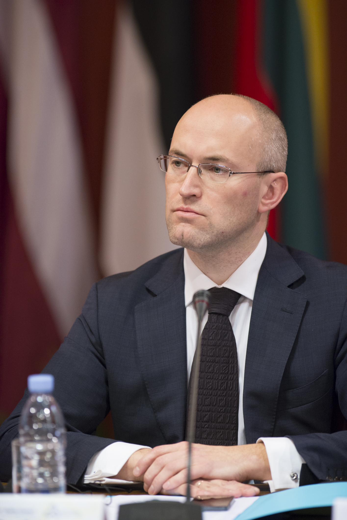 2013.gada 29.novembris. Baltijas Asamblejas preses konference. Foto: Reinis Inkēns, Saeimas Kanceleja Izmantošanas noteikumi: saeima.lv/lv/autortiesibas